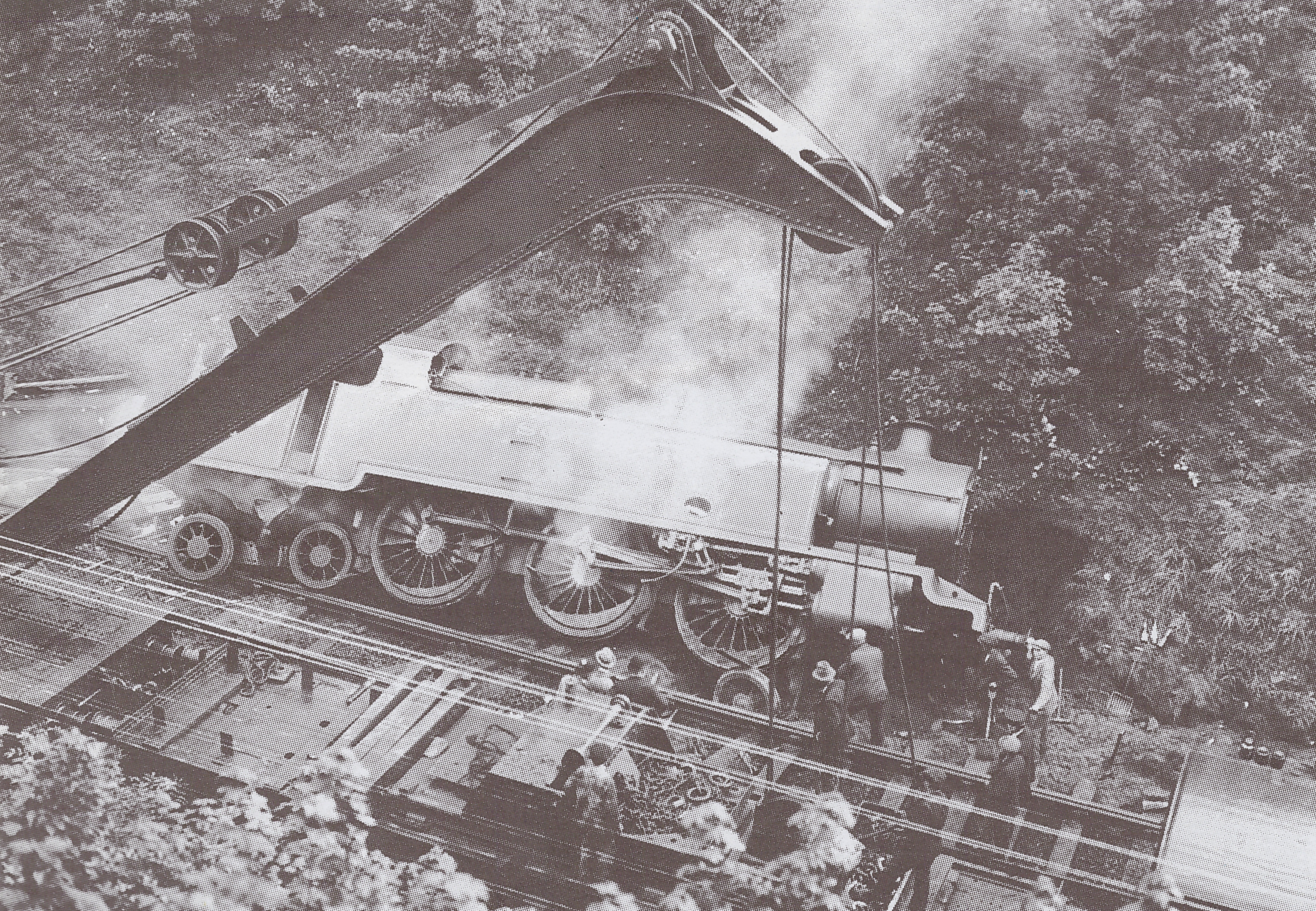 Accident ferroviaire de Sevenoaks du 24 août 1927 / La locomotive A800, River Class SECR K, "River Cray"